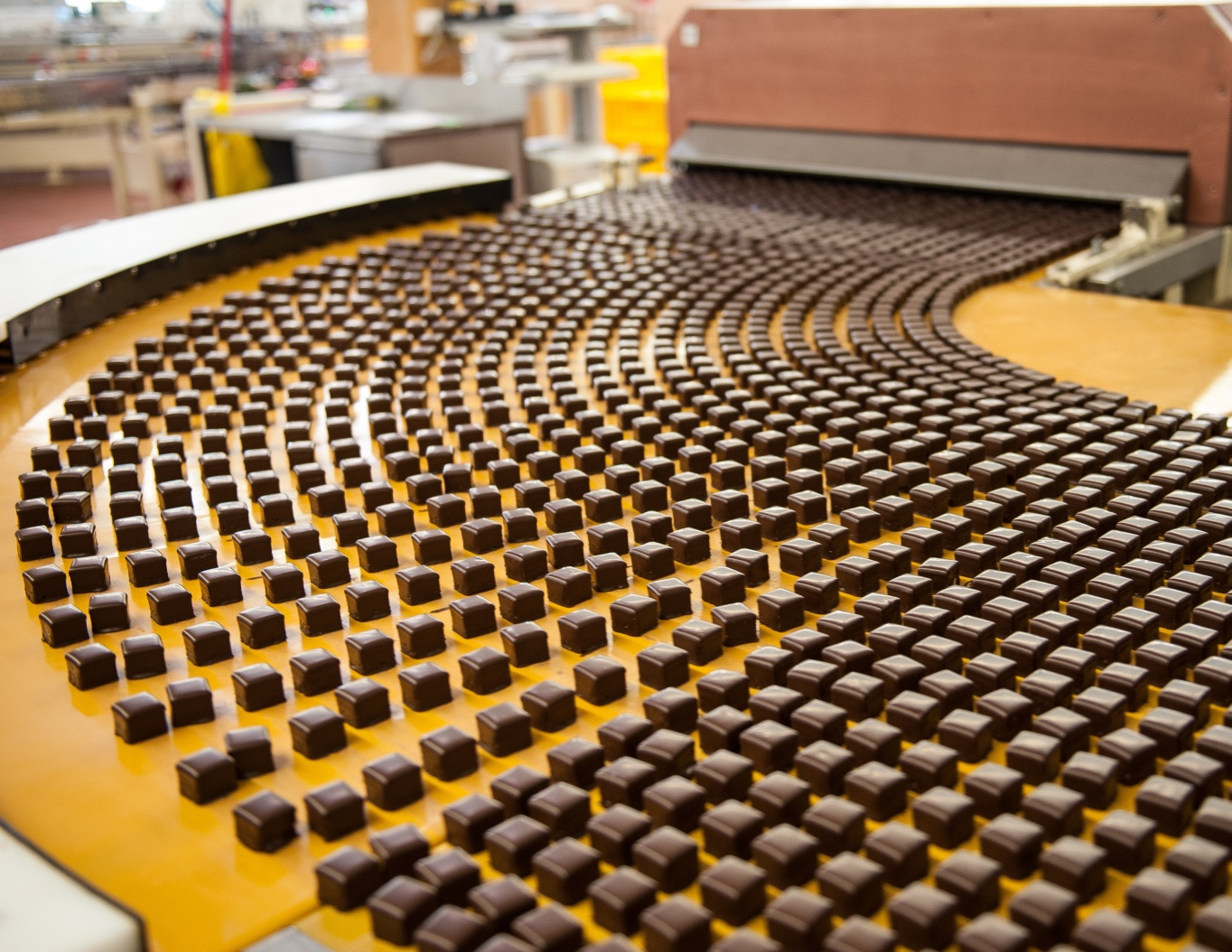 Produktionsstraße für Dominosteine in der Aachener Printen- und Schokoladenfabrik Henry Lambertz GmbH & Co. KG.